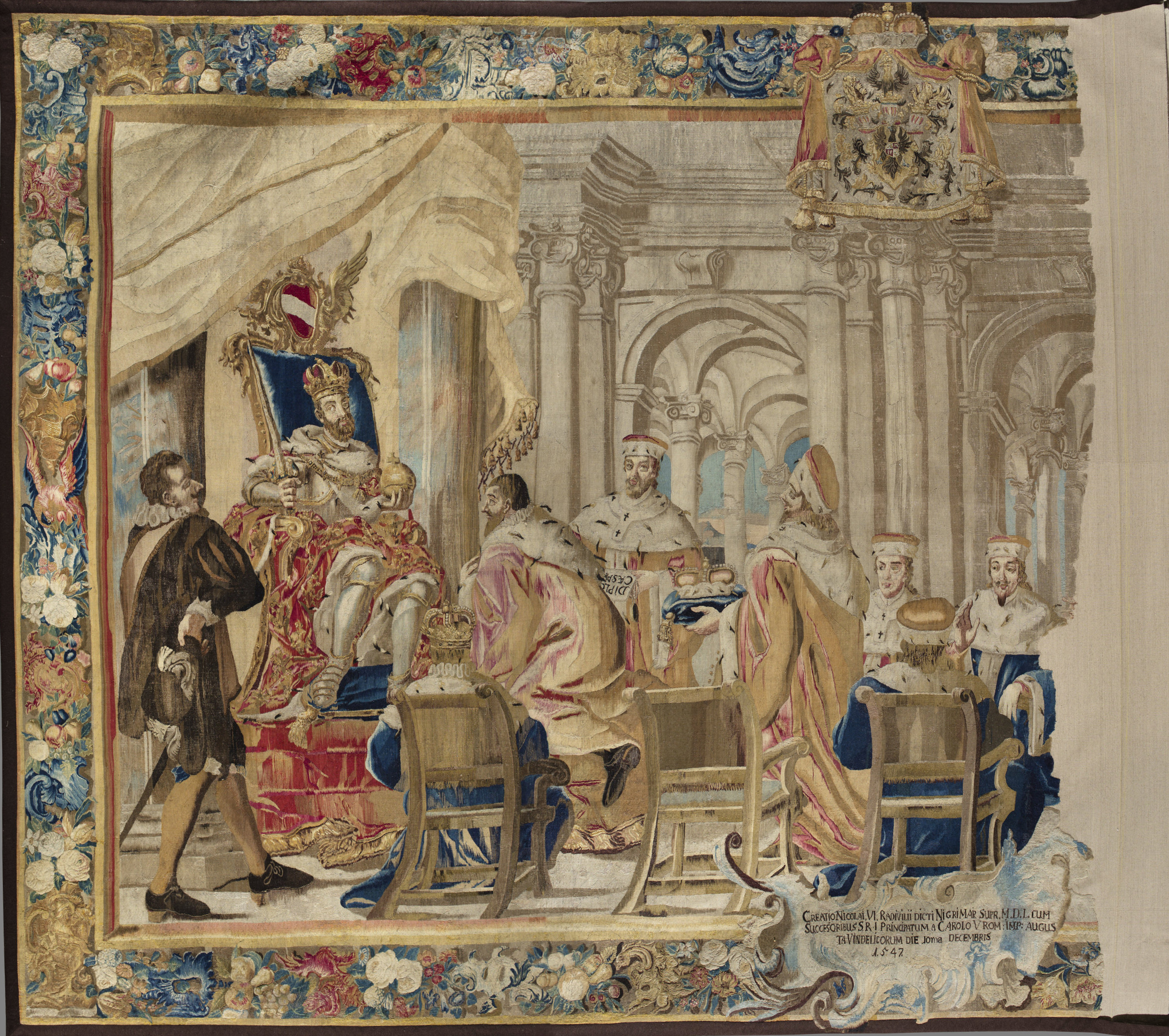 Беларуская (тарашкевіца): Мікалай Радзівіл «Чорны» (Mikałaj Radzivił «Čorny») атрымлівае тытул князя на Алыцы і Нясьвіжы ад імпэратара Карла V (Karl V). Габэлен